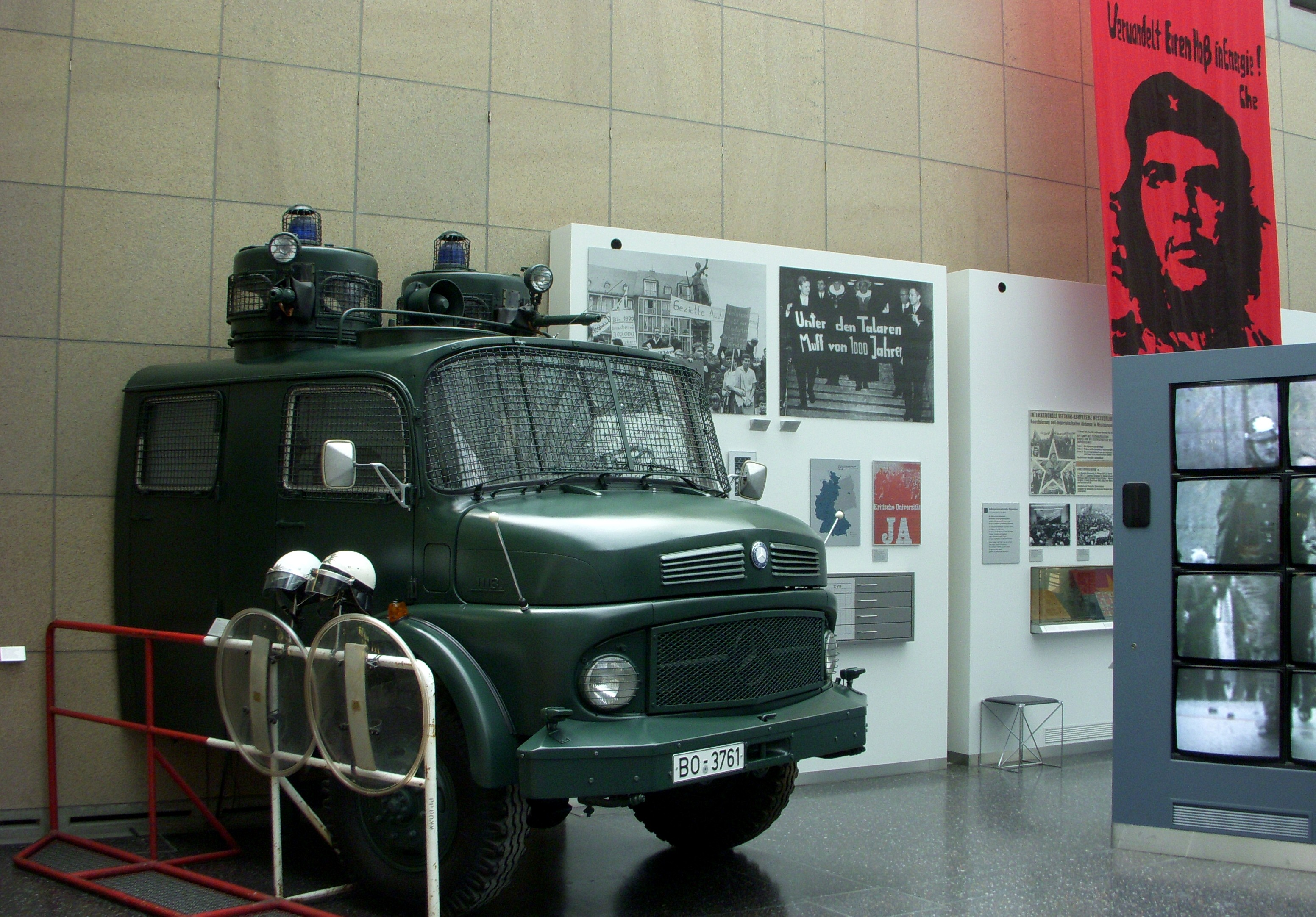 „Haus der Geschichte“ in Bonn, Studentenproteste 1968 mit Wasserwerfer Daimler-Benz (WaWe 4000)